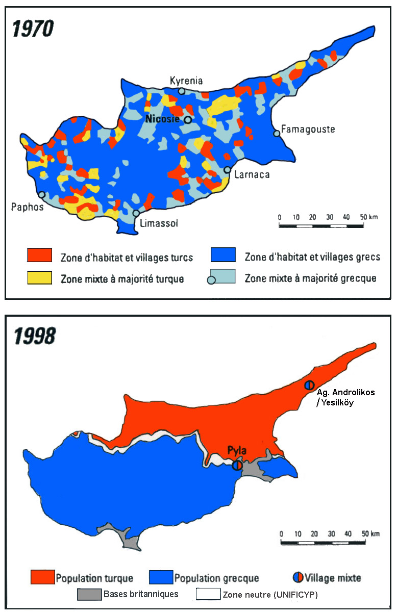 Situation de Chypre, 1970 et 1998, selon Marie-Pierre Richarte, La partition de Chypre: étude géopolitique, Univ. Paris IV, 1998.